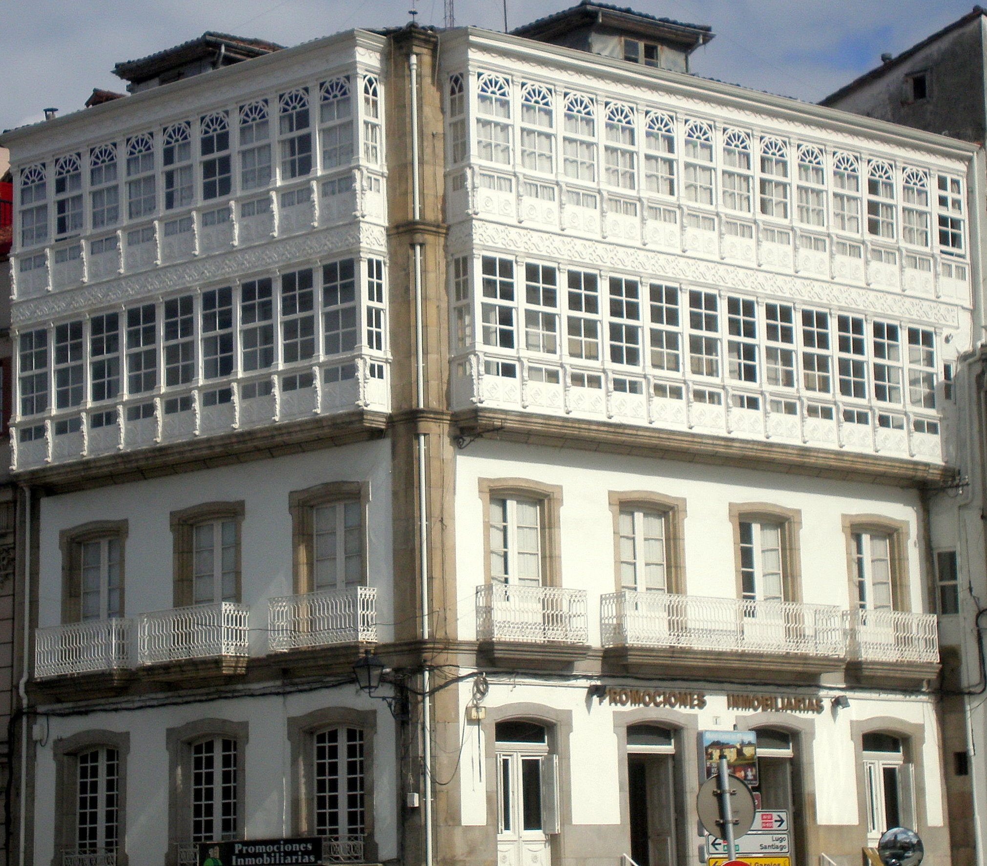 Betanzos, praza Irmáns Garcia Naveira